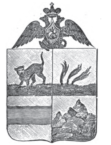 Герб Каспийской области 1843 года